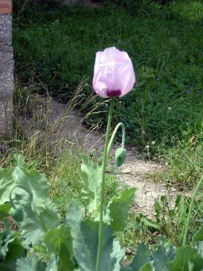 Мак олійний